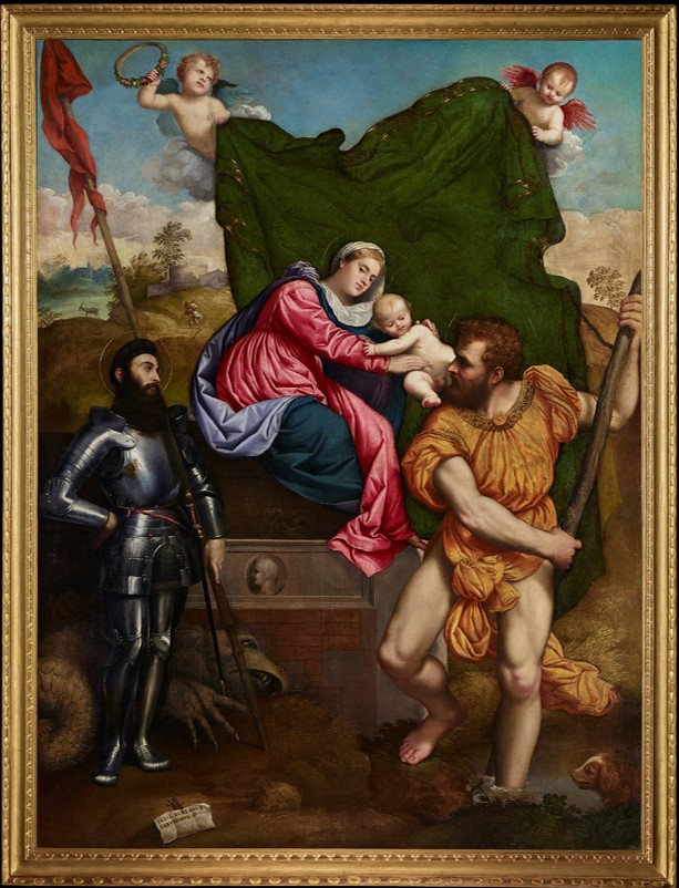 Paris Bordon (Treviso, 1500-Venezia, 1571) Madonna con il Bambino, San Cristoforo e San Giorgio (Pala Manfron) Olio su tela 217x164 cm P 67 Il dipinto dopo il restauro (novembre 2015-aprile 2016) sostenuto da Fondazione Credito Bergamasco.